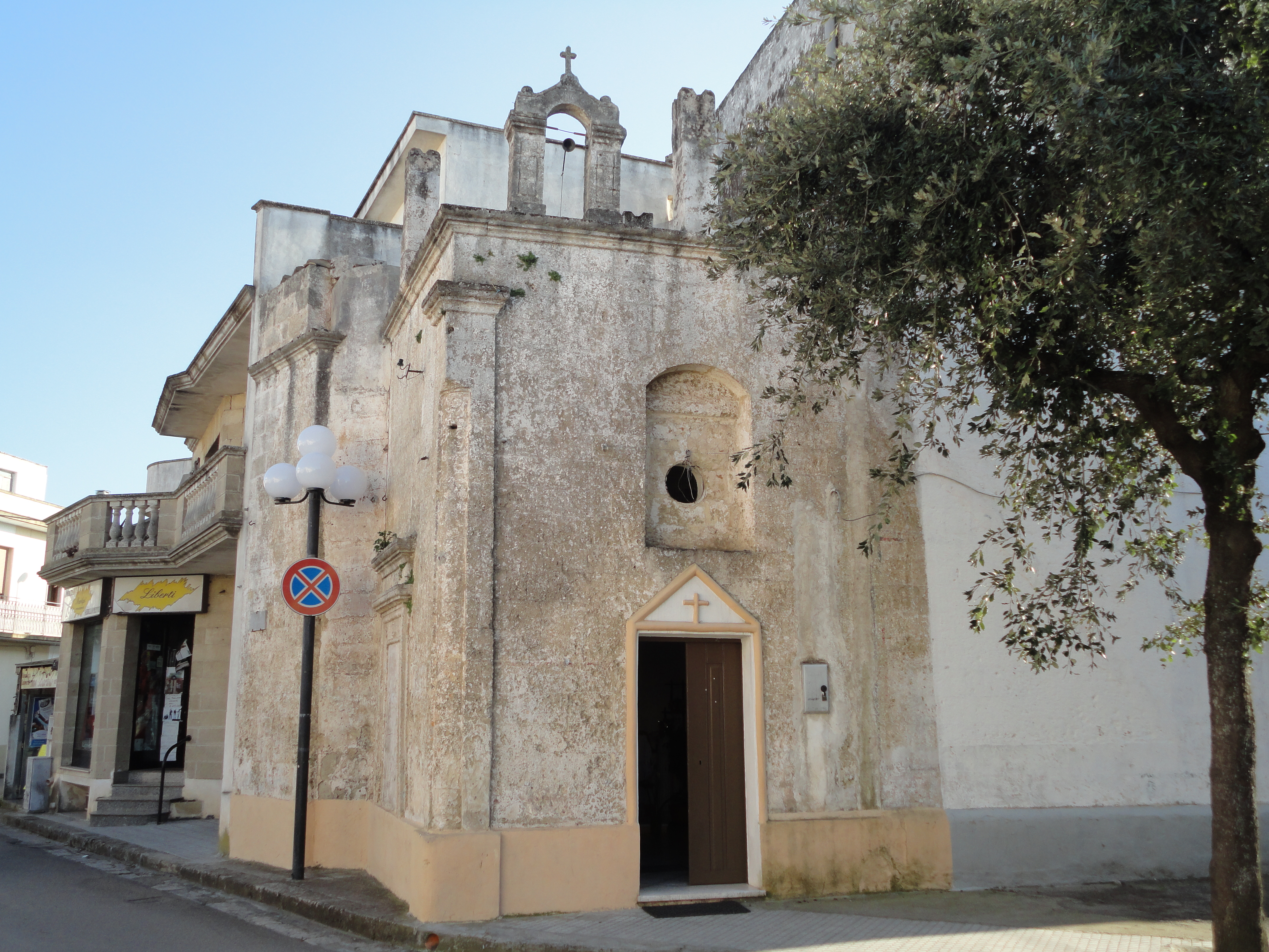 Cappella di San Bartolo Corsano